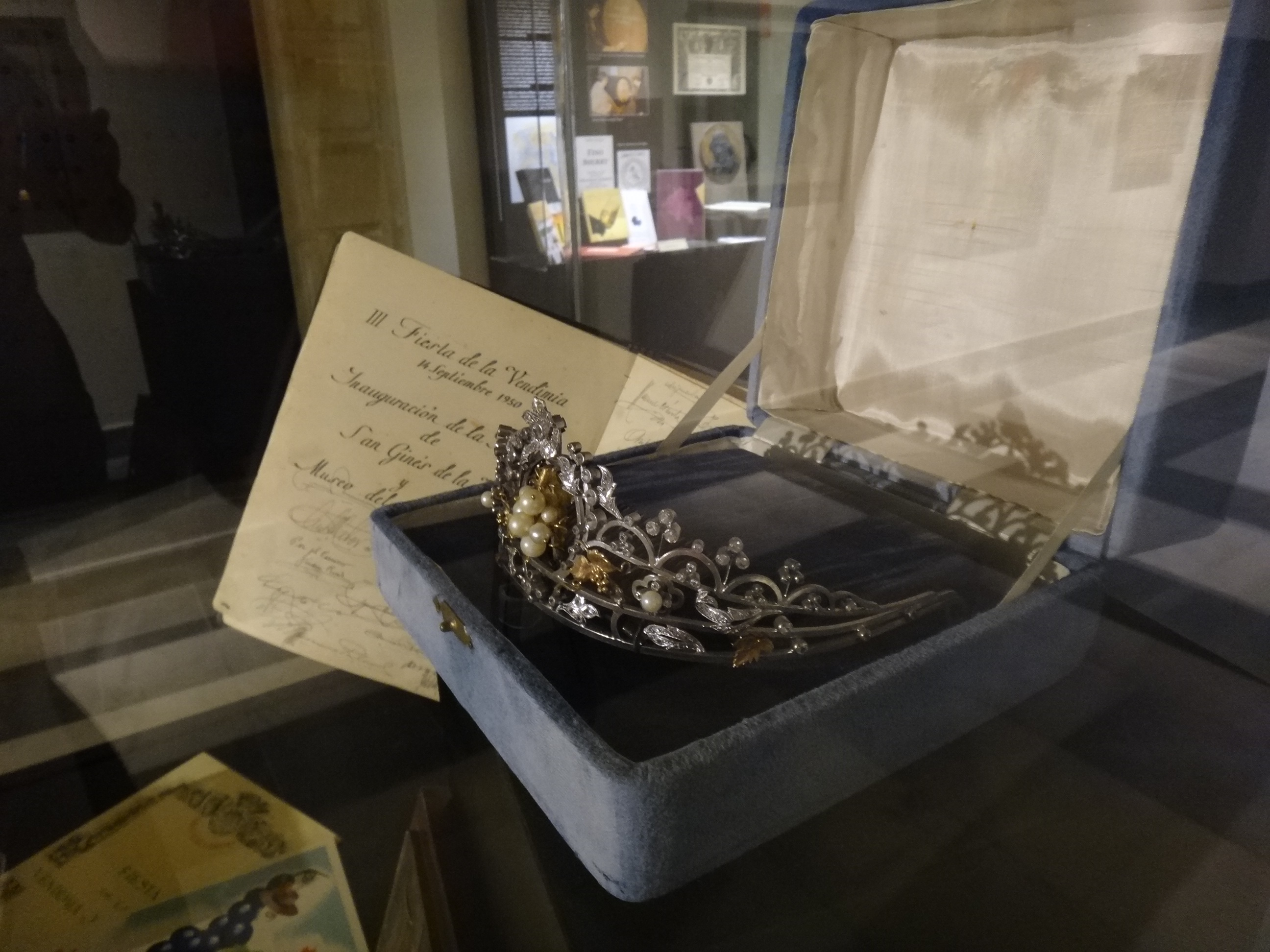 Exposición "80 años en defensa de lo nuestro" del Consejo Regulador de la Denominación de Origen Jerez Xérès Sherry en los Claustros de Santo Domingo (Jerez de la Frontera, España)